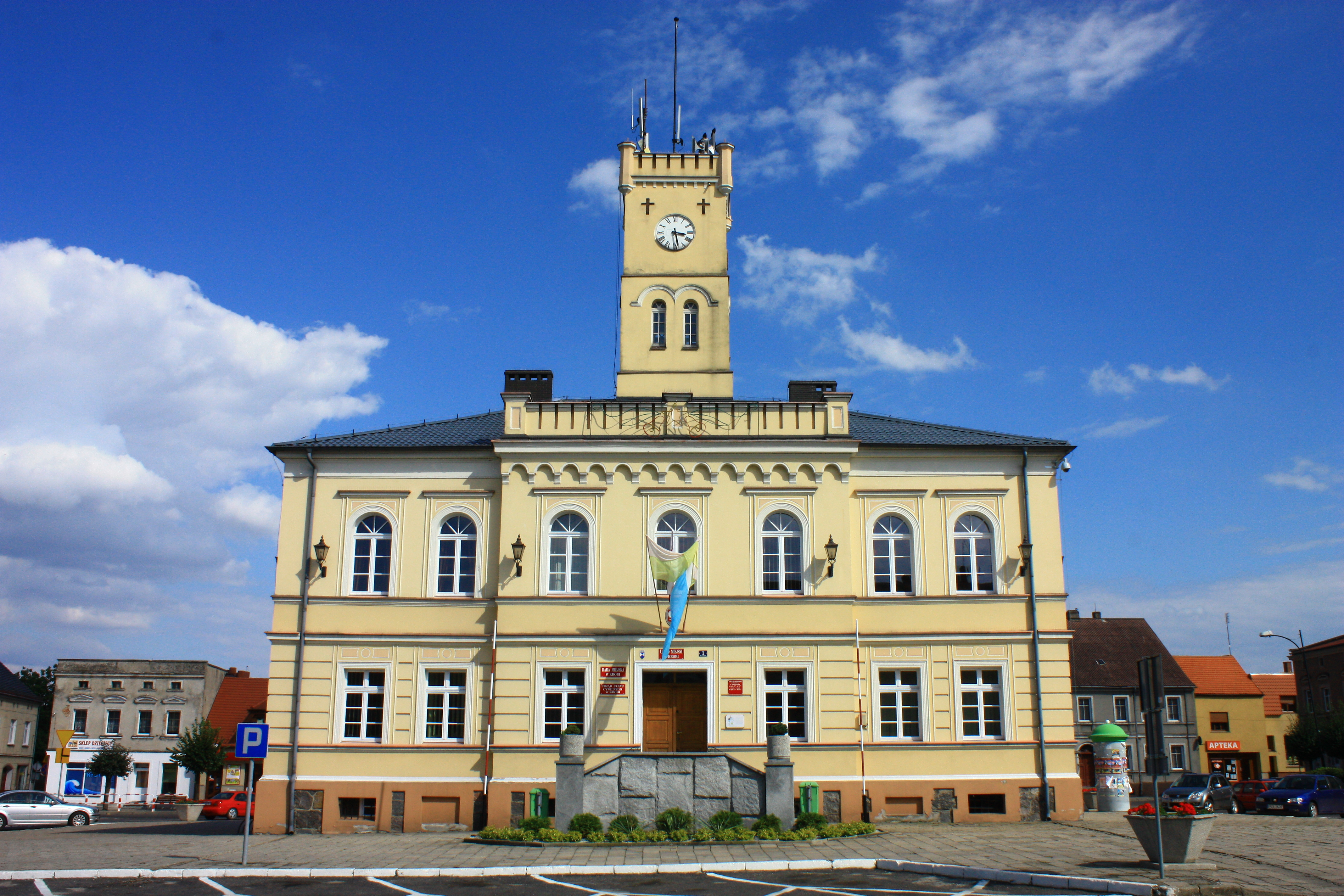 Krobia, ratusz, 1795, XIX